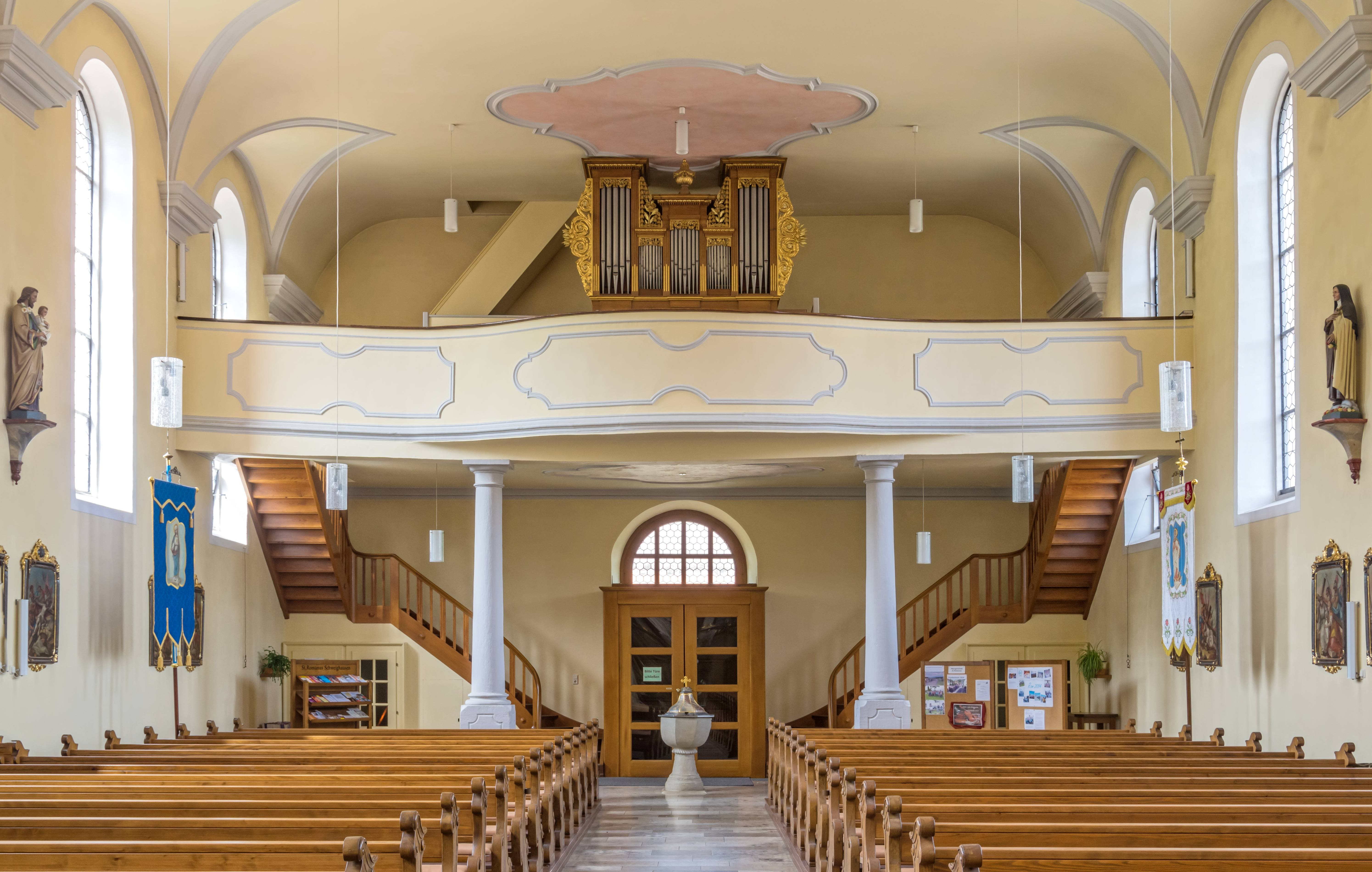 Bilder von der Kirche St. Romanus in Schweighausen Blick zum Haupteingang und Orgel